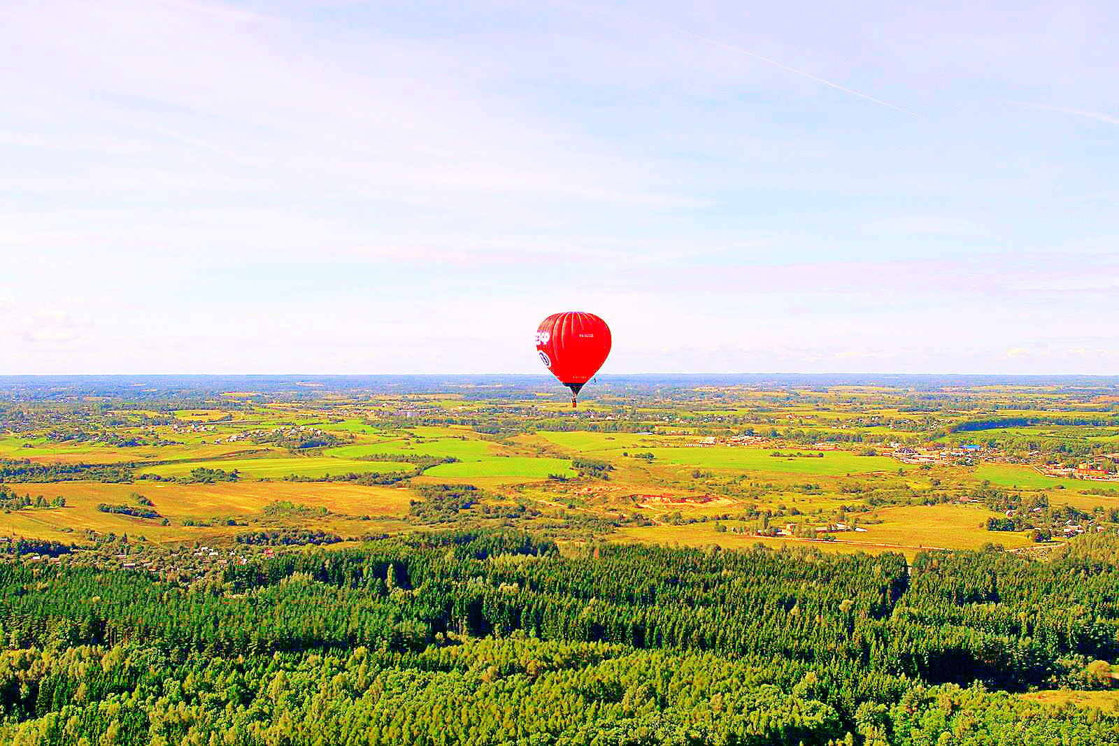 Панорама Великолукского района